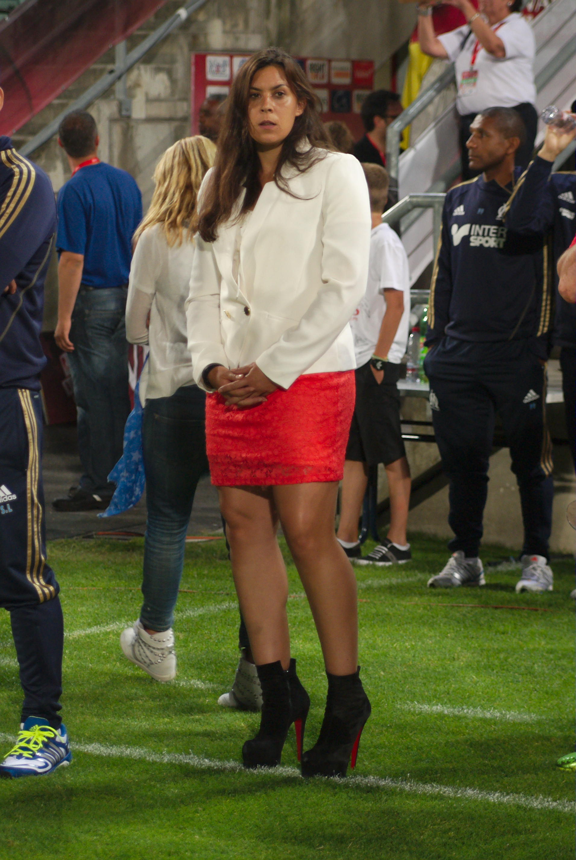 Valais Cup 2013 - OM-FC Porto - 20130713 - Marion Bartoli